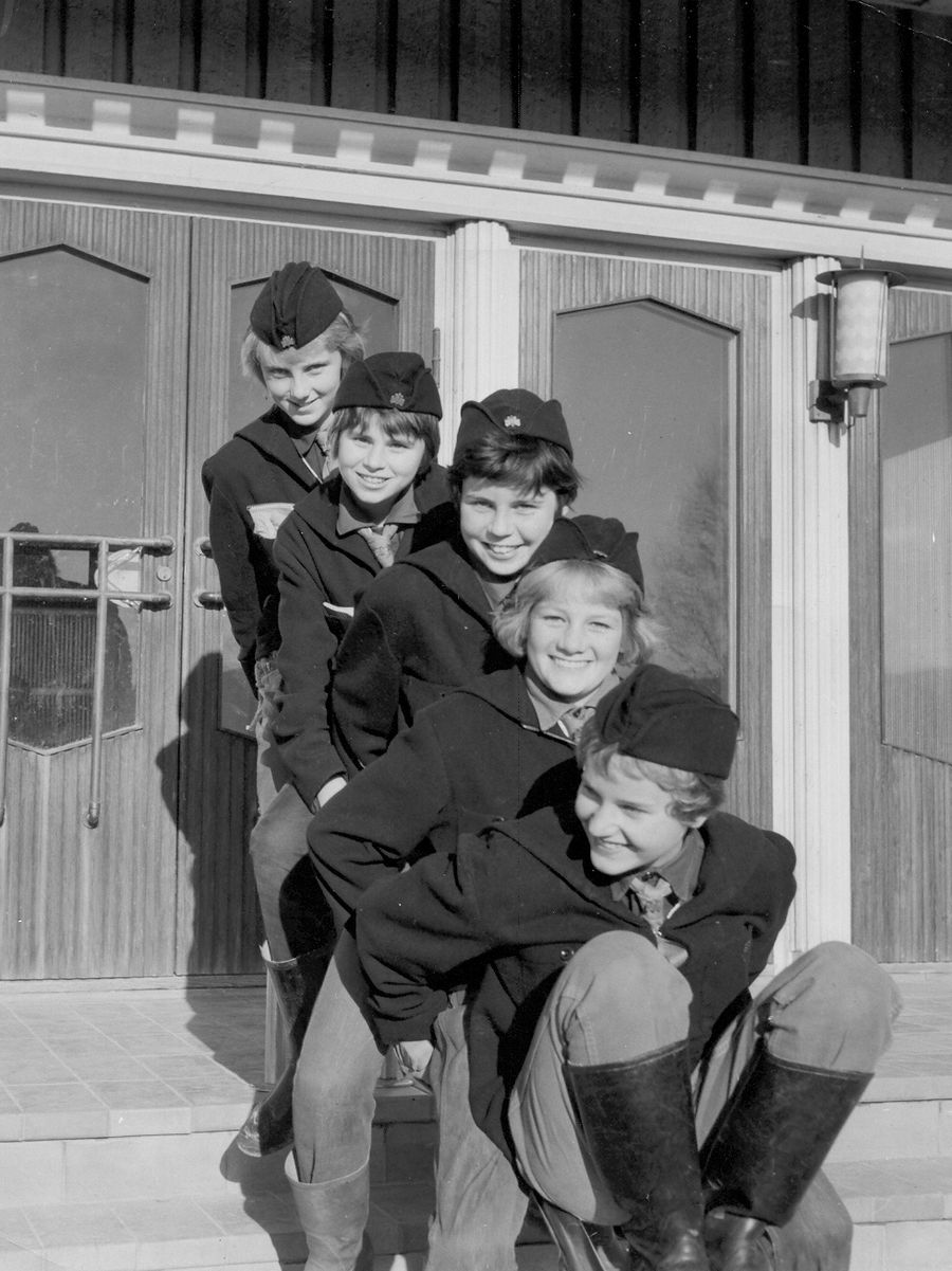 Elitpatrull inom SFS, 50-tal